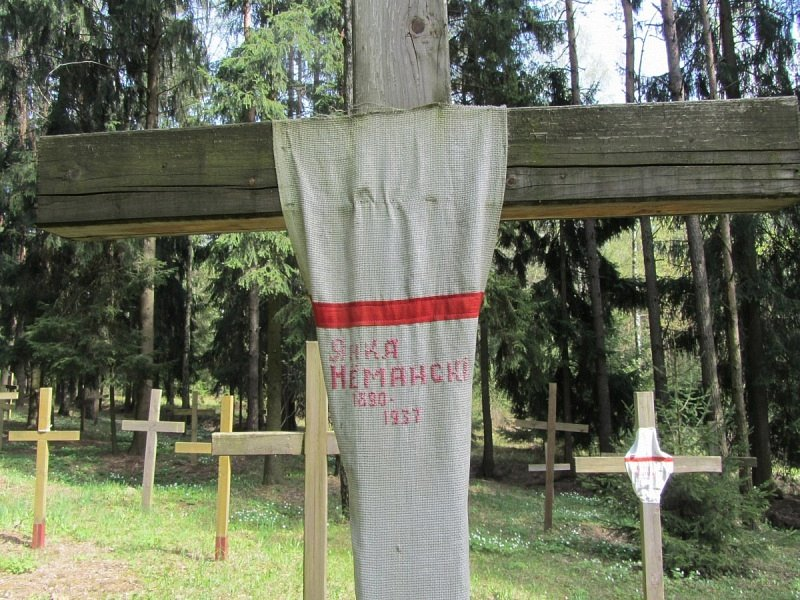 Мінск. Курапаты